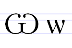 Cyrylicka litera omega.